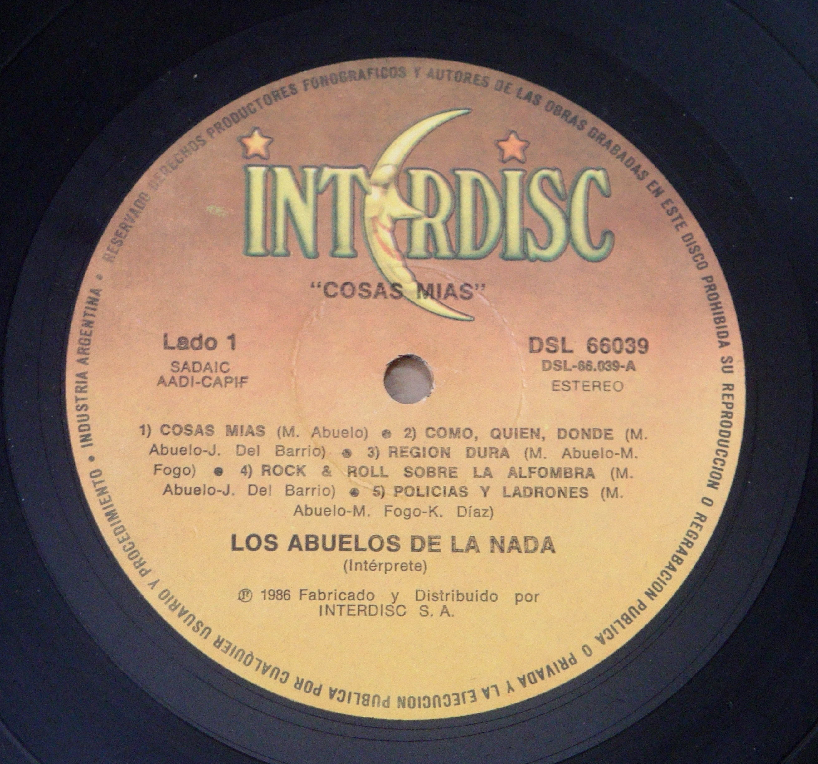 Fotografía del álbum "Cosas mías" de Los Abuelos de la Nada, editado en 1986 por Interdisc en formato vinilo.